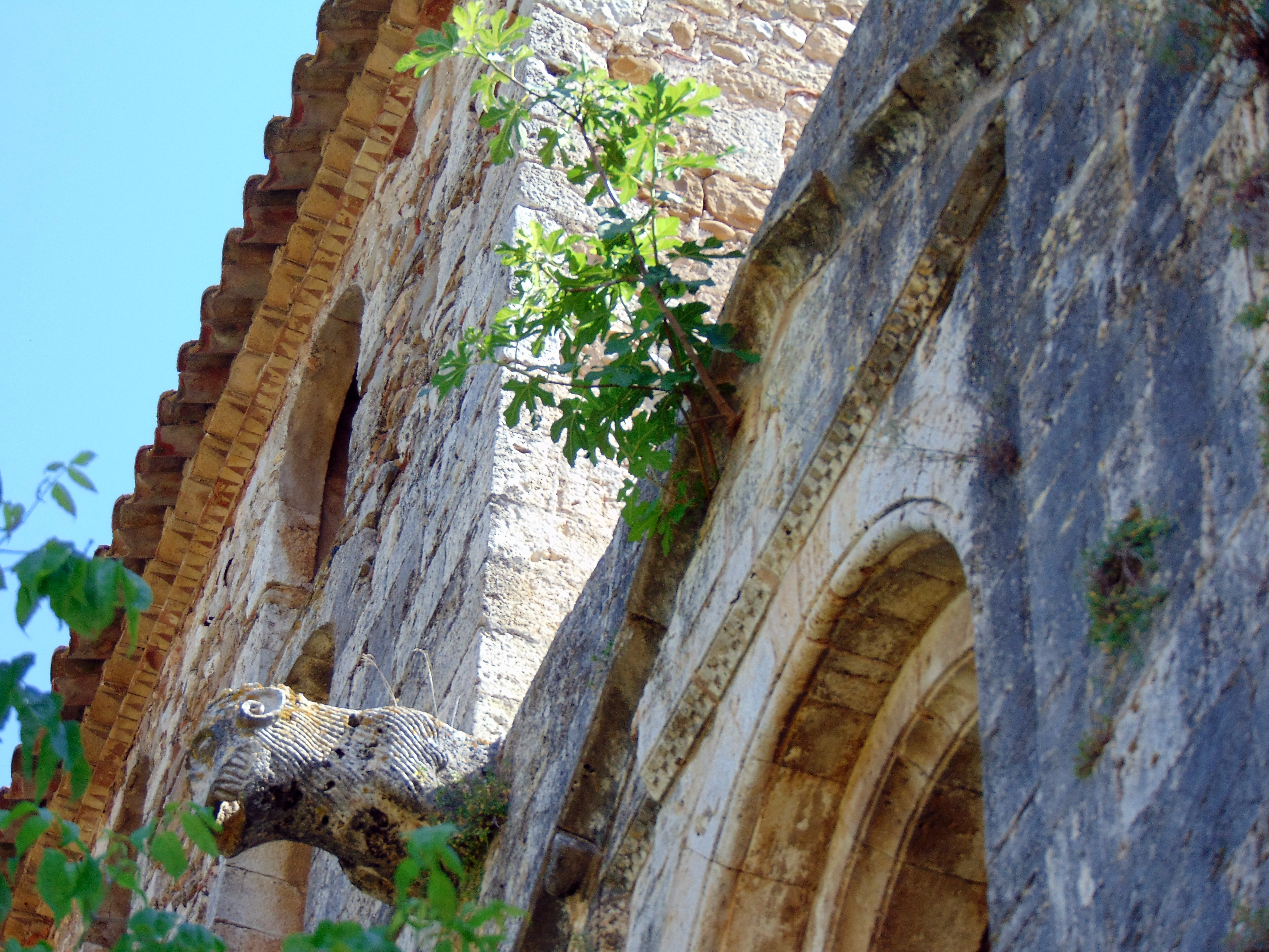 Església parroquial de Santa Eulàlia (Crespià)